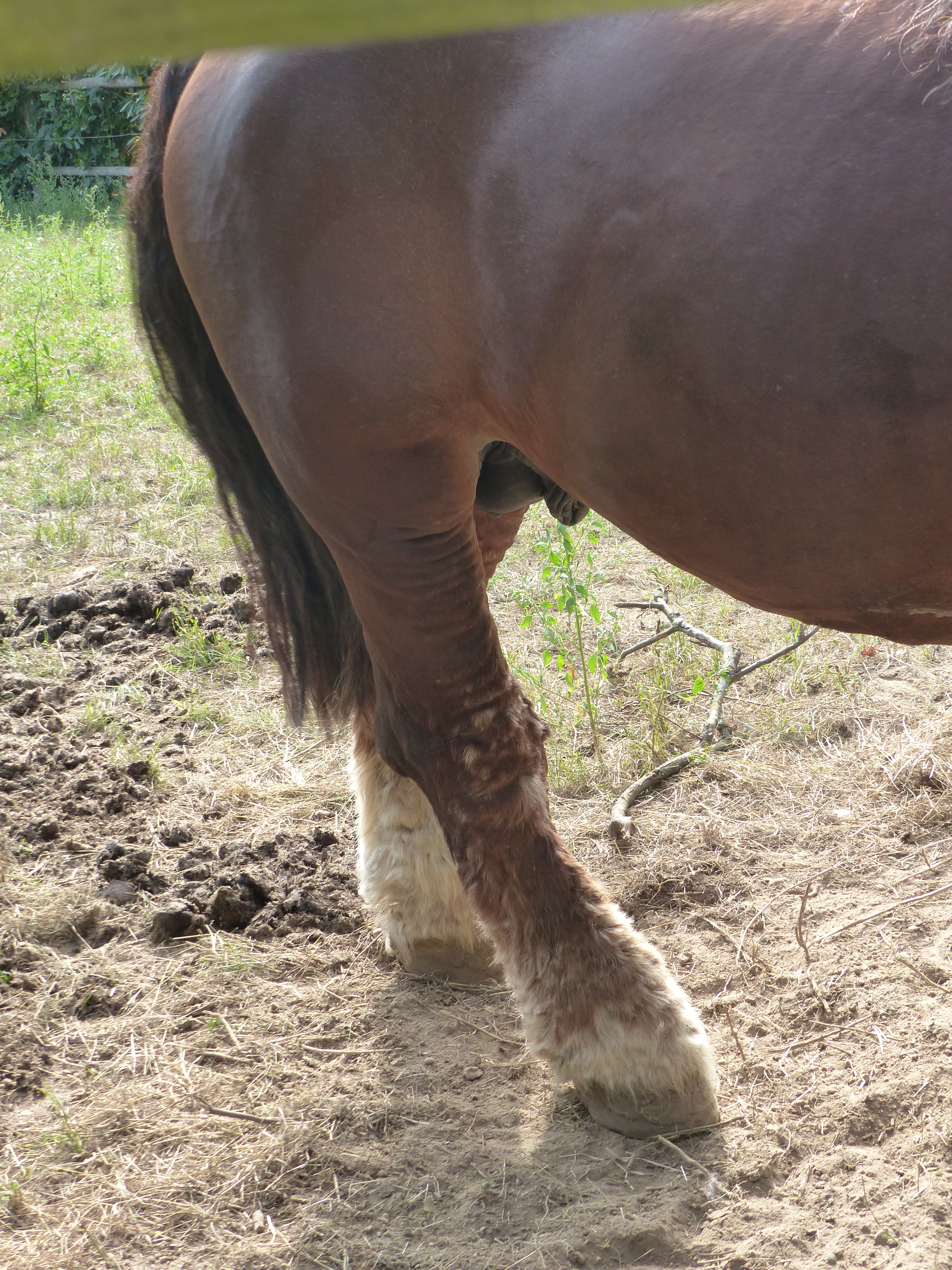 Pieds et membres postérieurs d'un cheval de trait